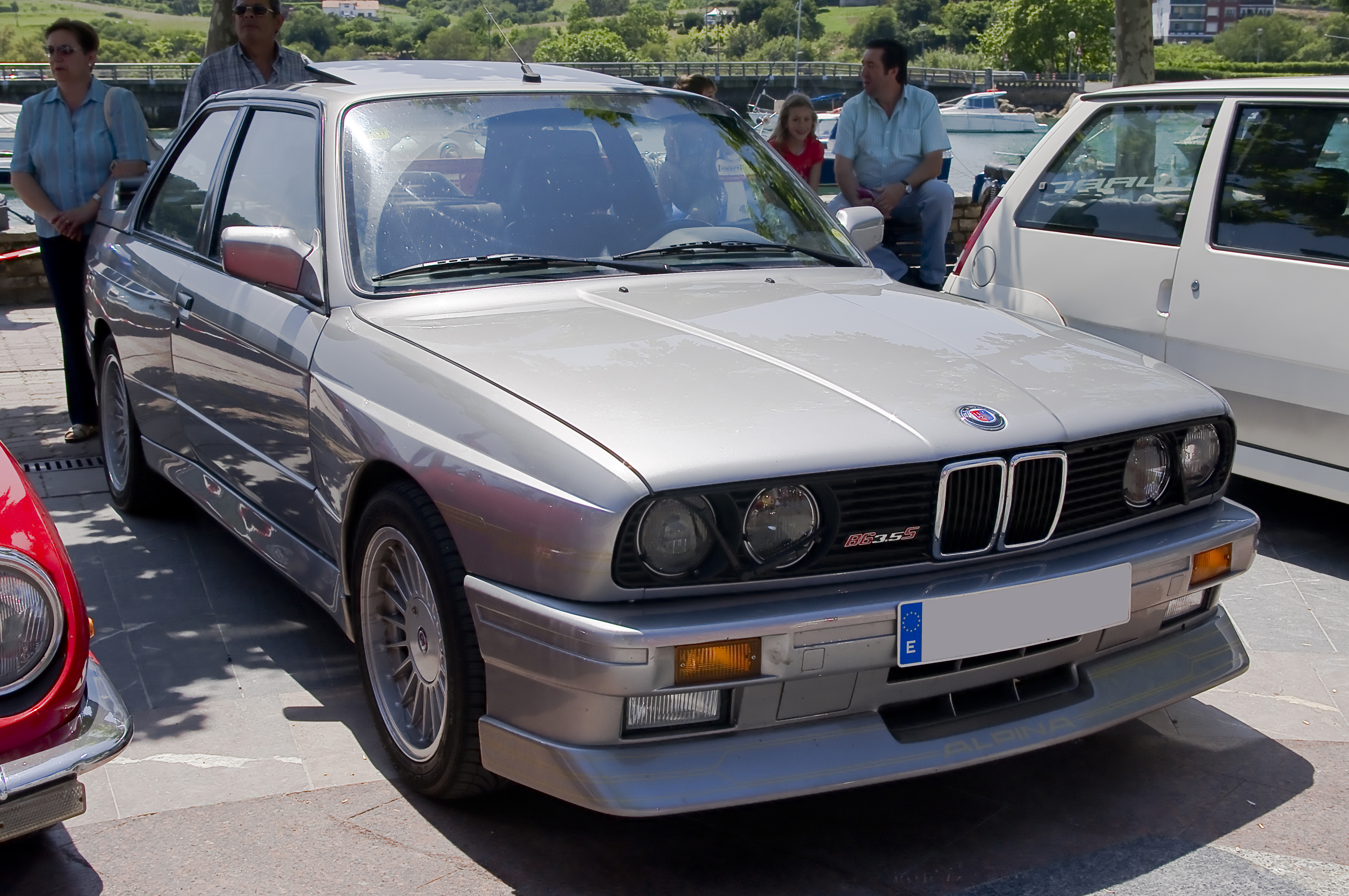 Alpina B6 3.5 S